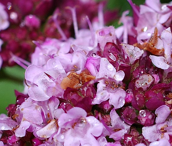 Origanum vulgare